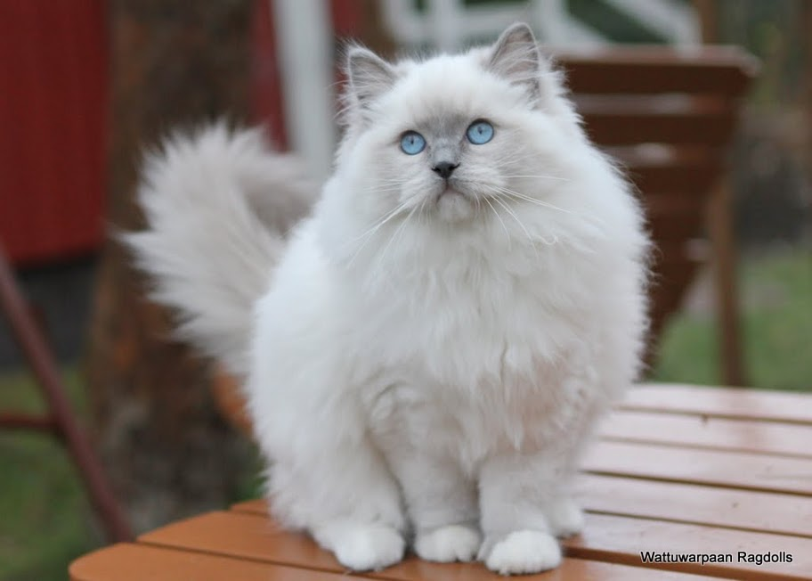 IInes eine wunderschöne Ragdoll Katze in blue mitted die aus Finland zu und kam.